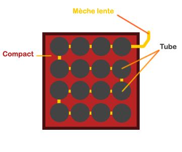 Scema d'un compact de feu d'artifice